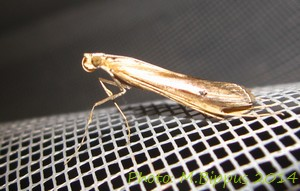 Euclasta whalleyii